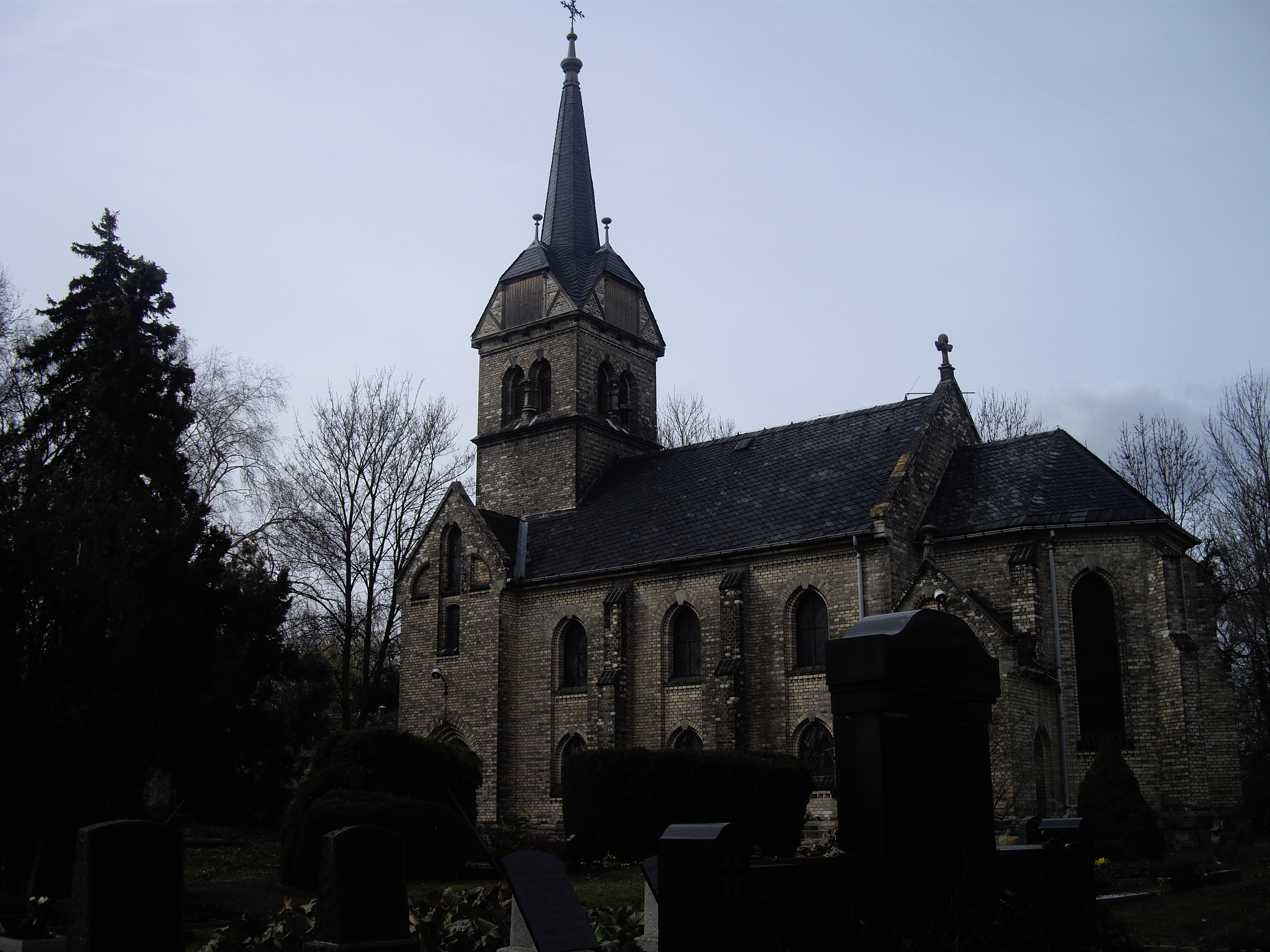 Die Dorfkirche von Schwitterdorf